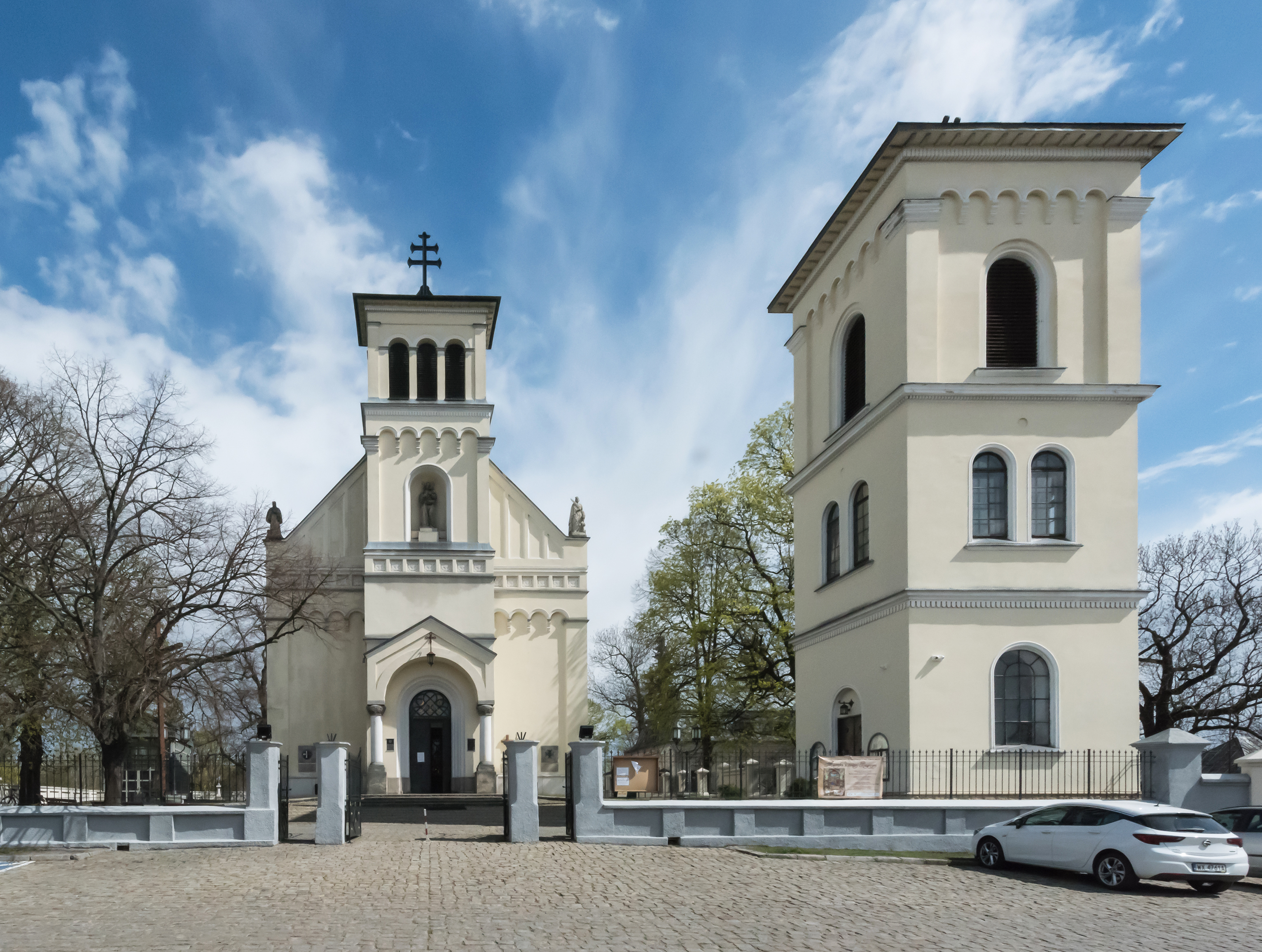 Kościół św. Katarzyny w Warszawie